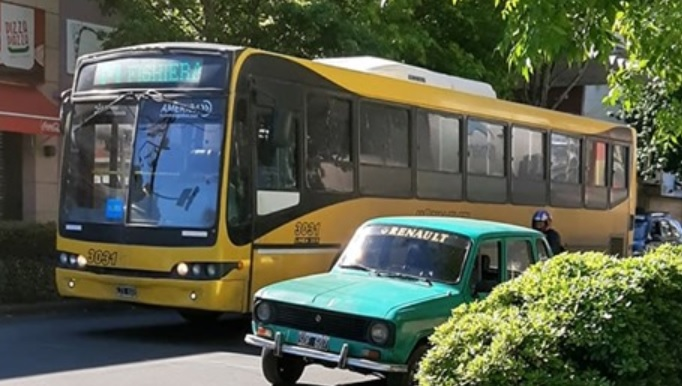 Mercedes-Benz carrozado por Nuovobus, de la línea M. En la cartelera aparece Fighiera, uno de los destinos.